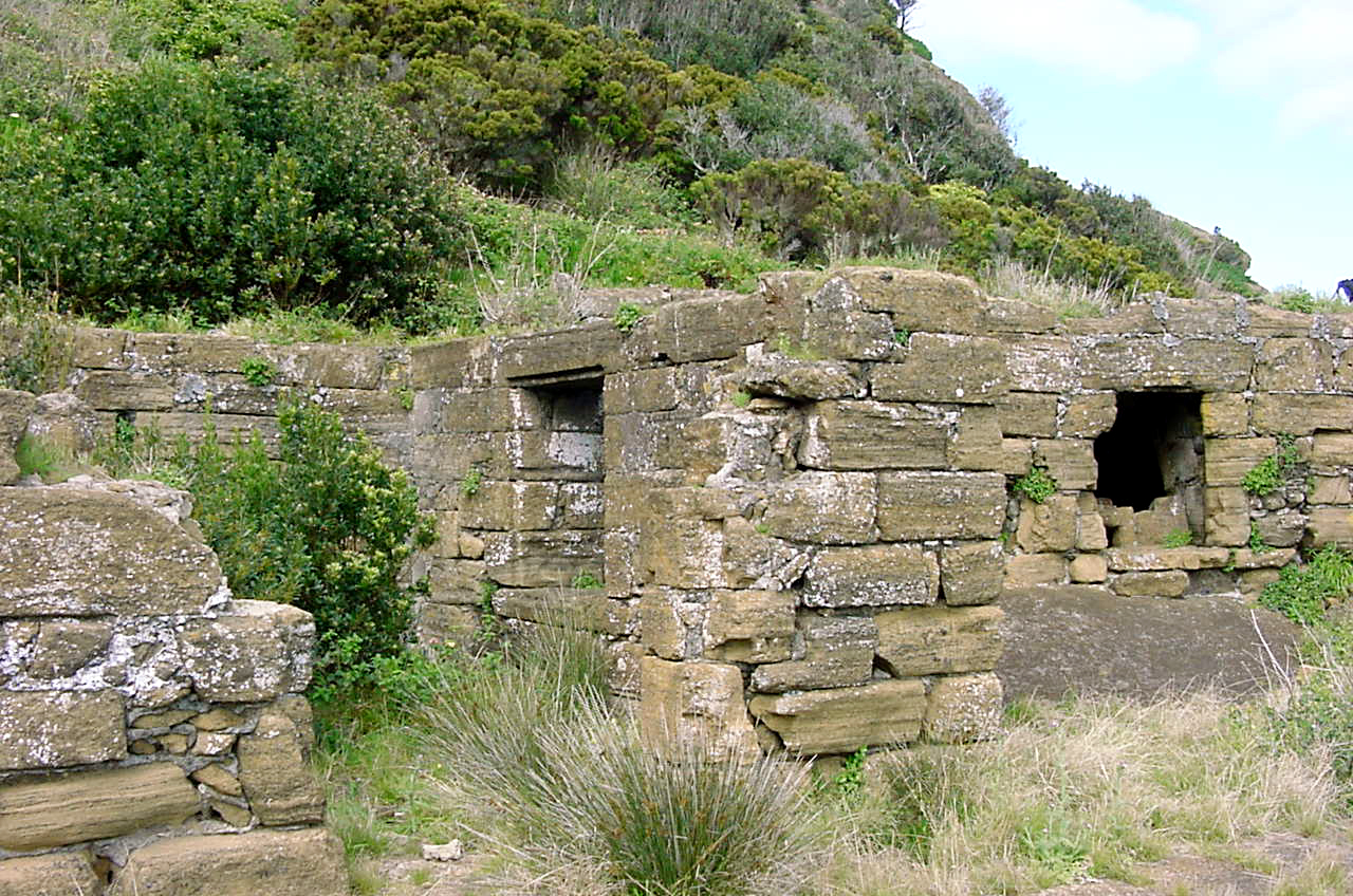 Fortaleza de São João Baptista do Monte Brasil, freguesia da Sé, cidade e concelho de Angra do Heroísmo, ilha Terceira, Açores: restos da muralha do Forte de São Benedito do Monte Brasil.